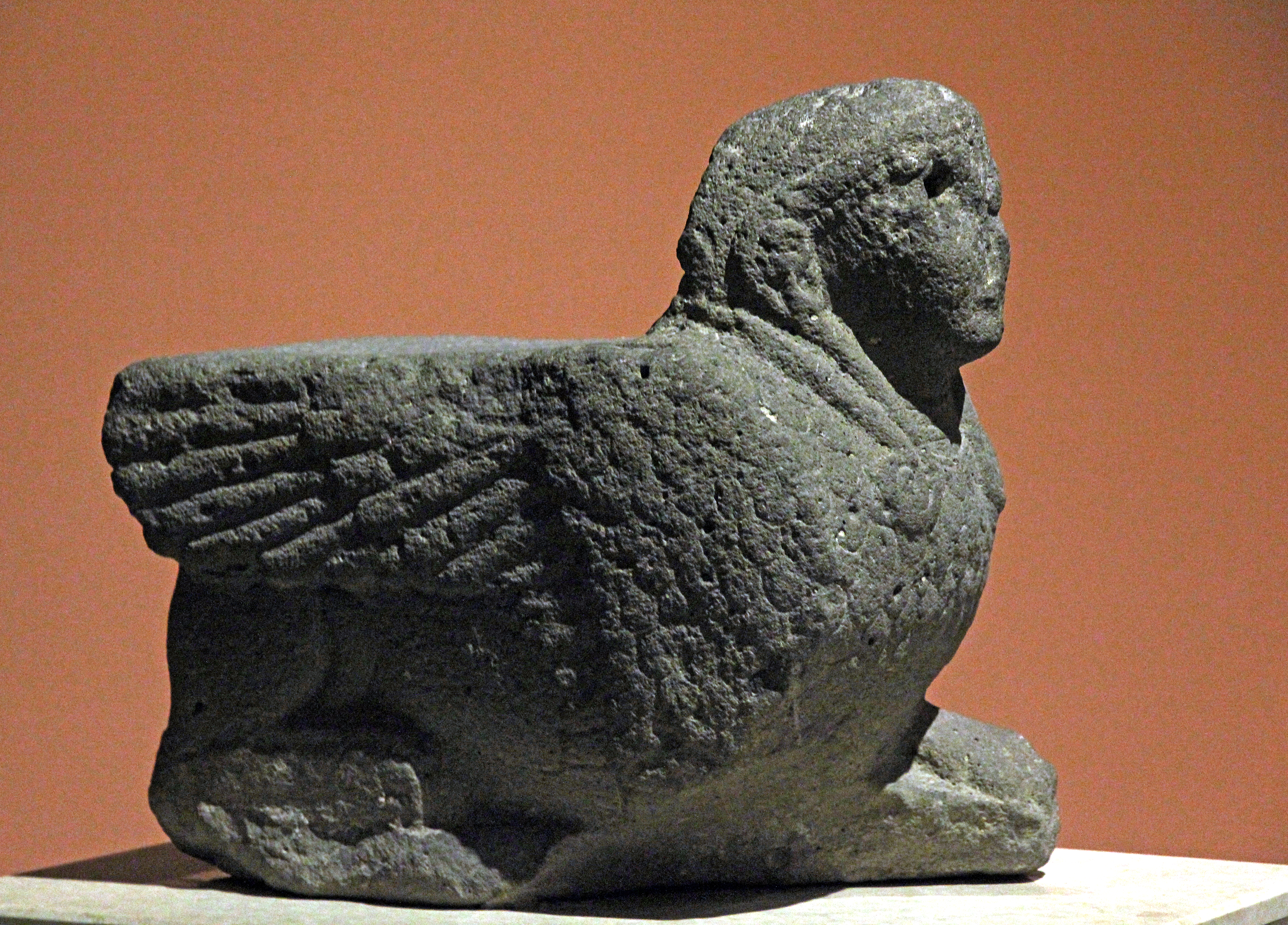 Archäologisches Museum Kahramanmaraş, Türkei, späthethitische Sphinx